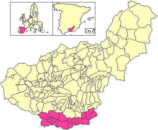 Situación de la Mancomunidad de Municipios de la Costa Tropical respecto a la provincia de Granada, en España.